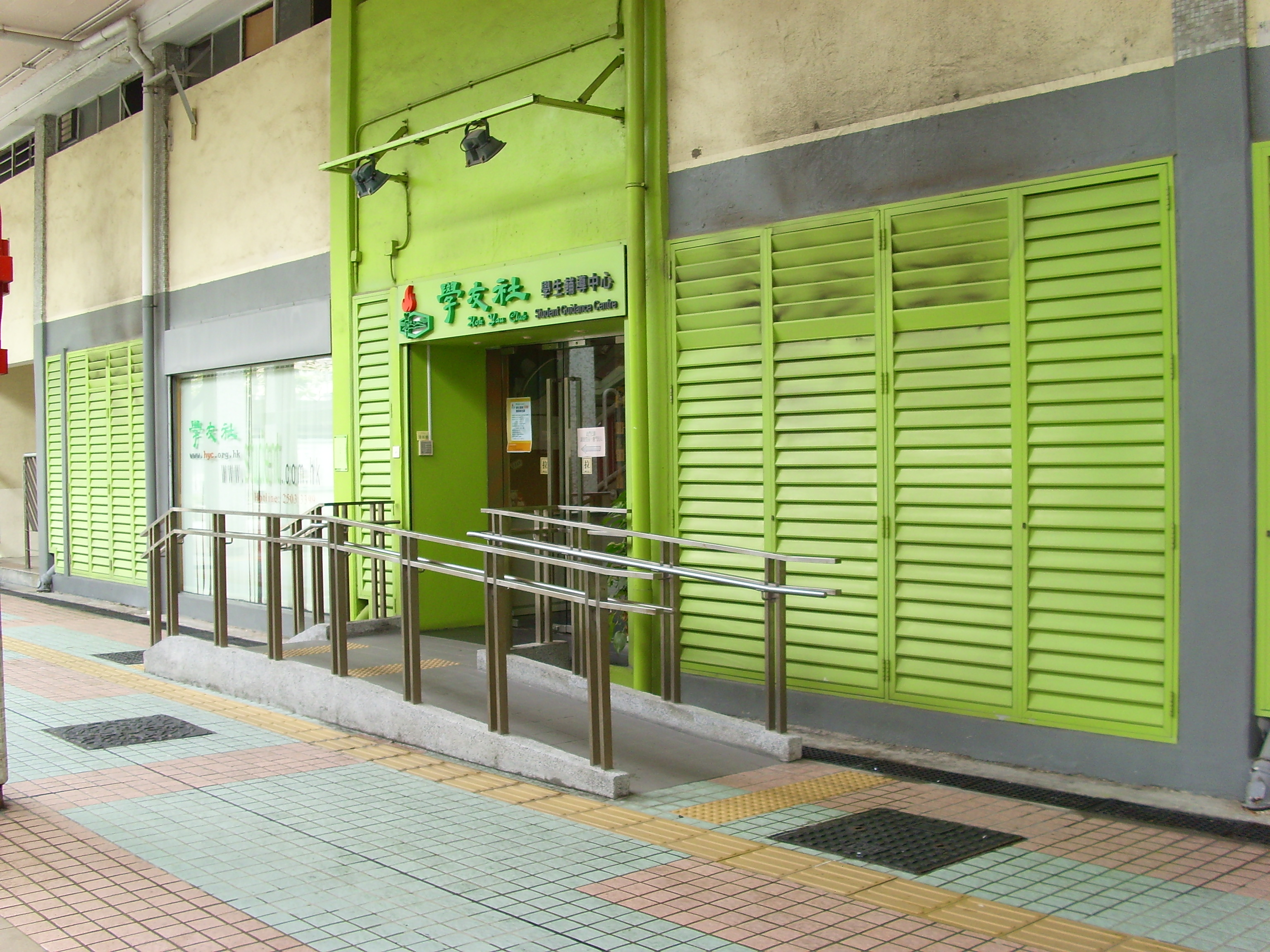 Hok Yau Club Student Guidance Centre 學友社學生輔導中心